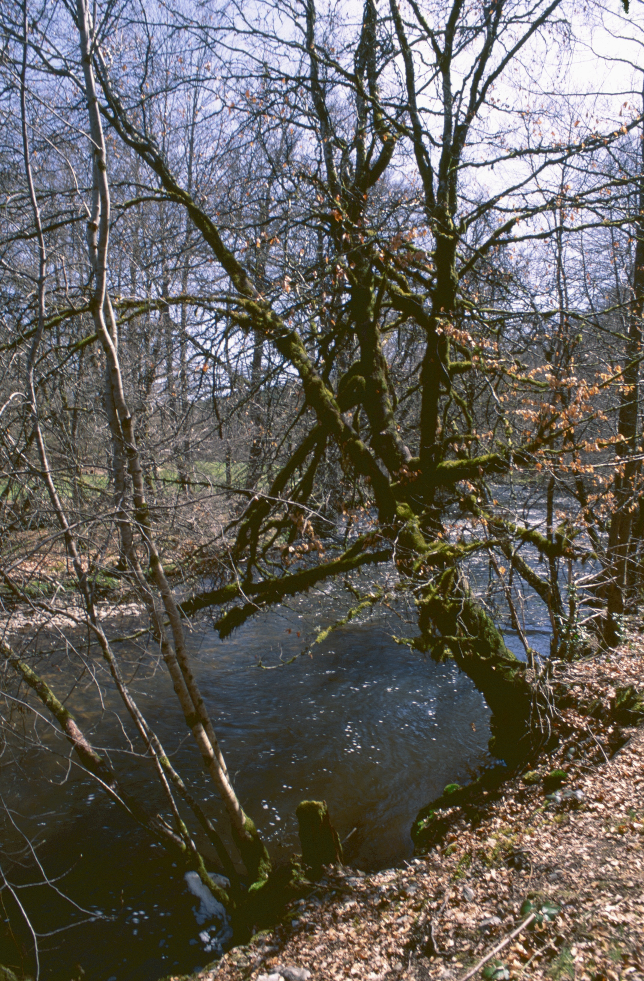 La Diège sur le plateau de Millevache, près du hameau de Confolent (ST-Pardoux-le-Vieux)